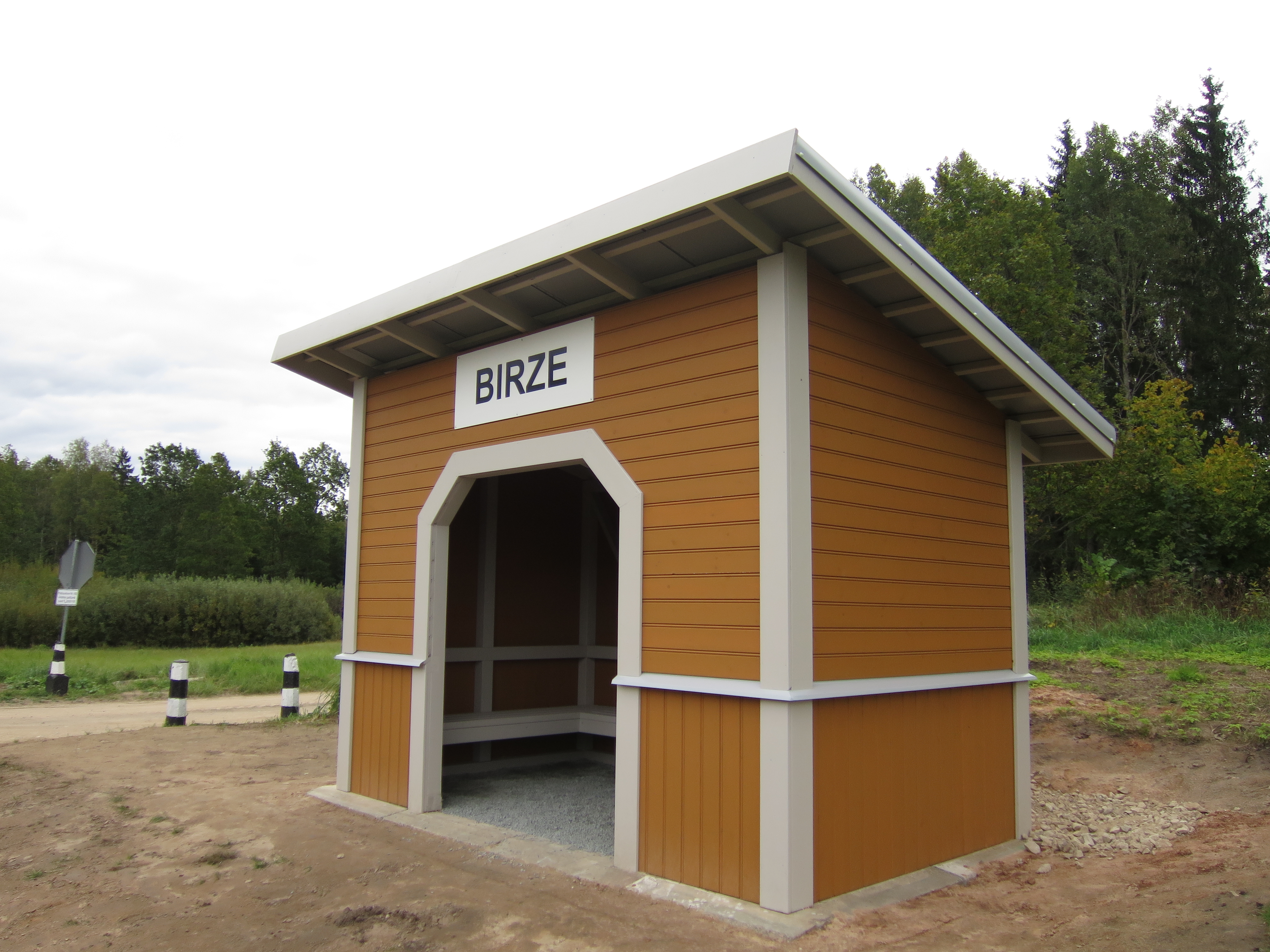 Birzes šaursliežu stacija